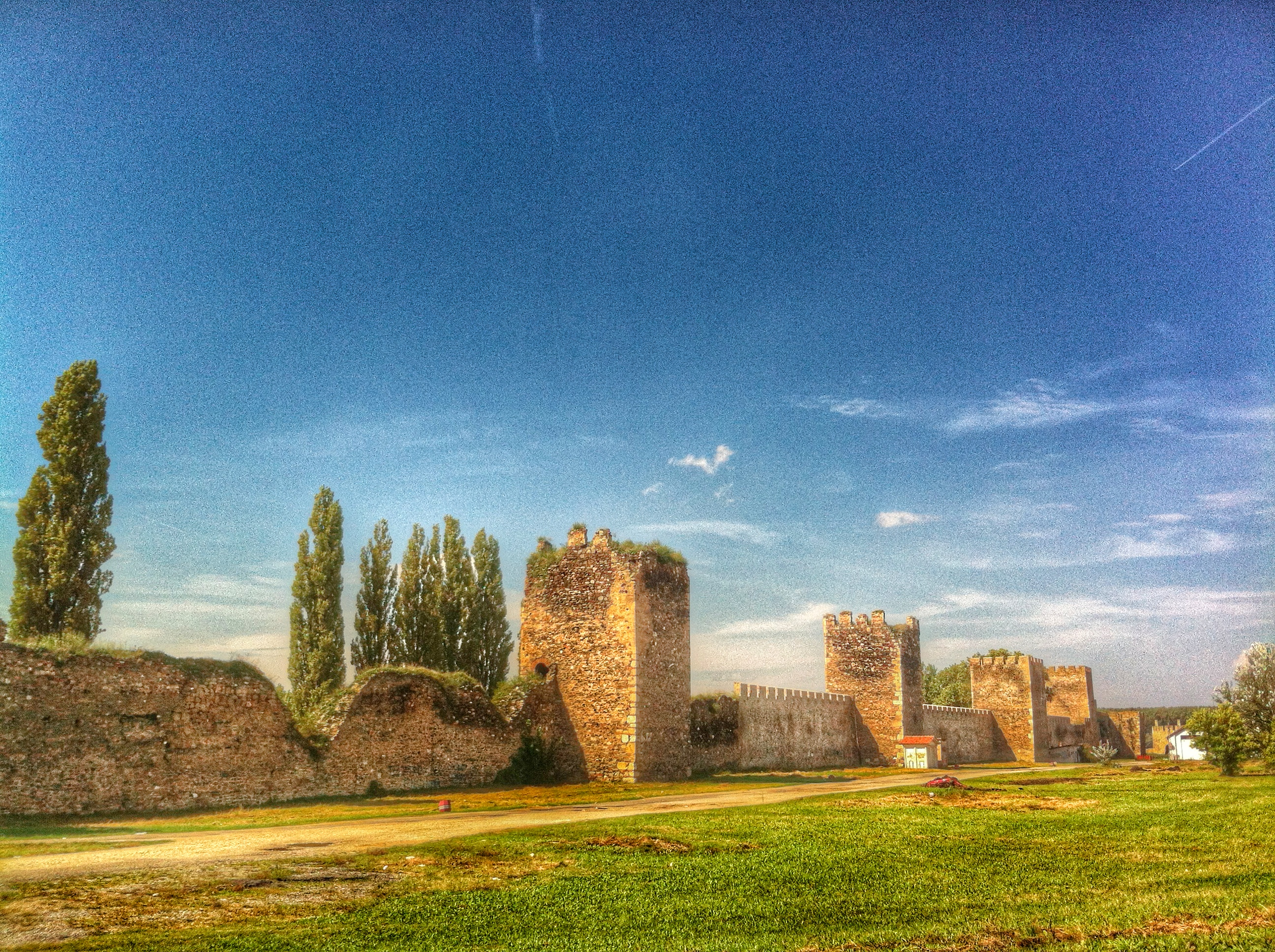 Српски (ћирилица): Подигао ју је деспот Ђурађ Бранковић 1428.године и по површини једна је од највећих у Европи.